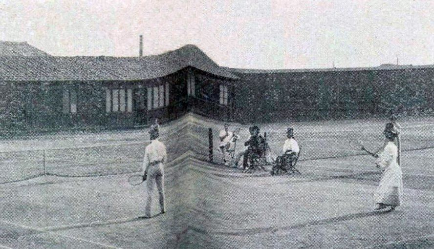 Max Decugis et mme Decugis-Flameng, à l'entrainement lors des JO intercallaires d'Athène en 1906 (Decugis three gold medals - simple man, double men, double mixt).